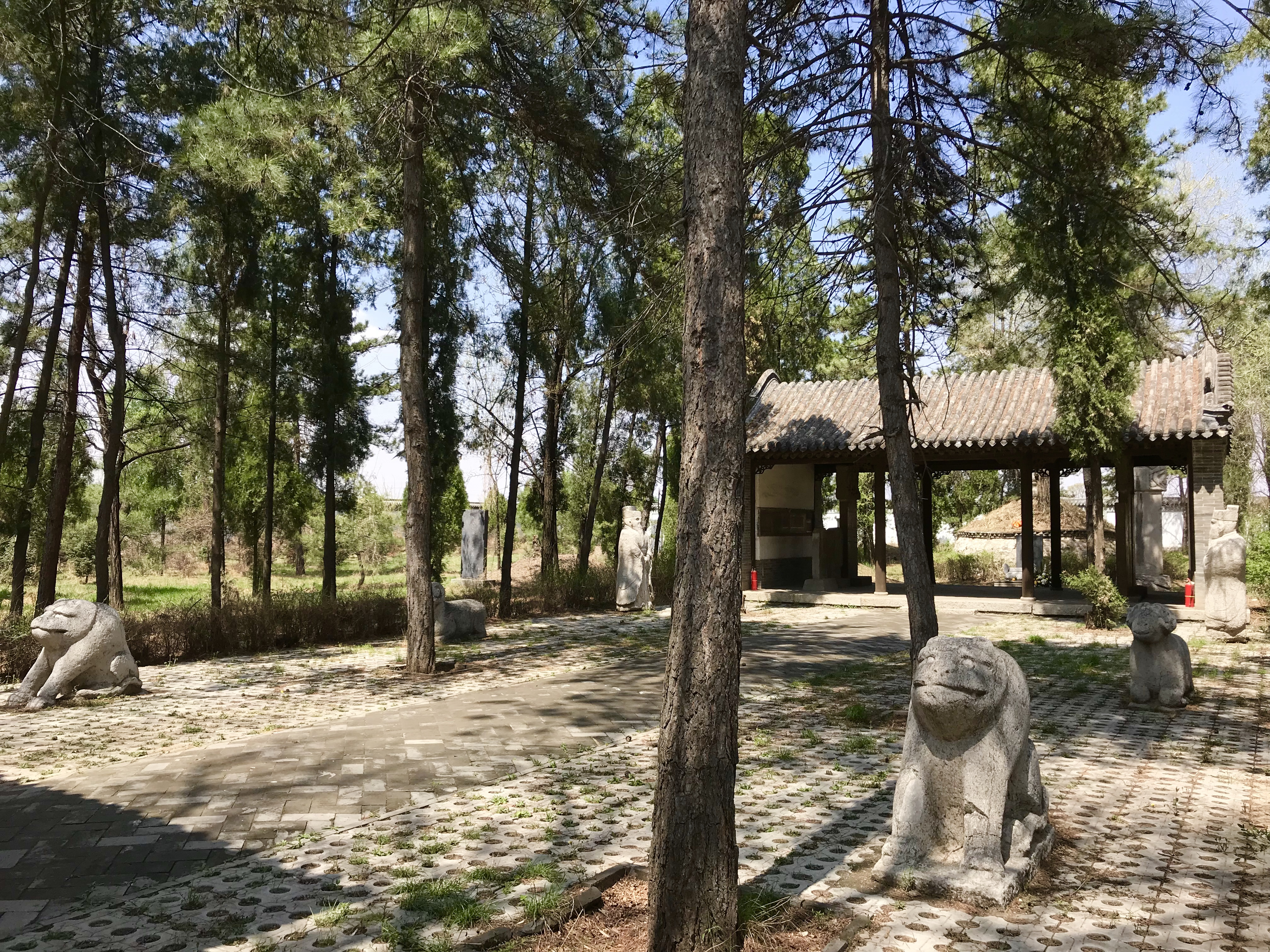 中文（台灣）: 山西省忻州市忻府區韓岩村元好問墓墓道